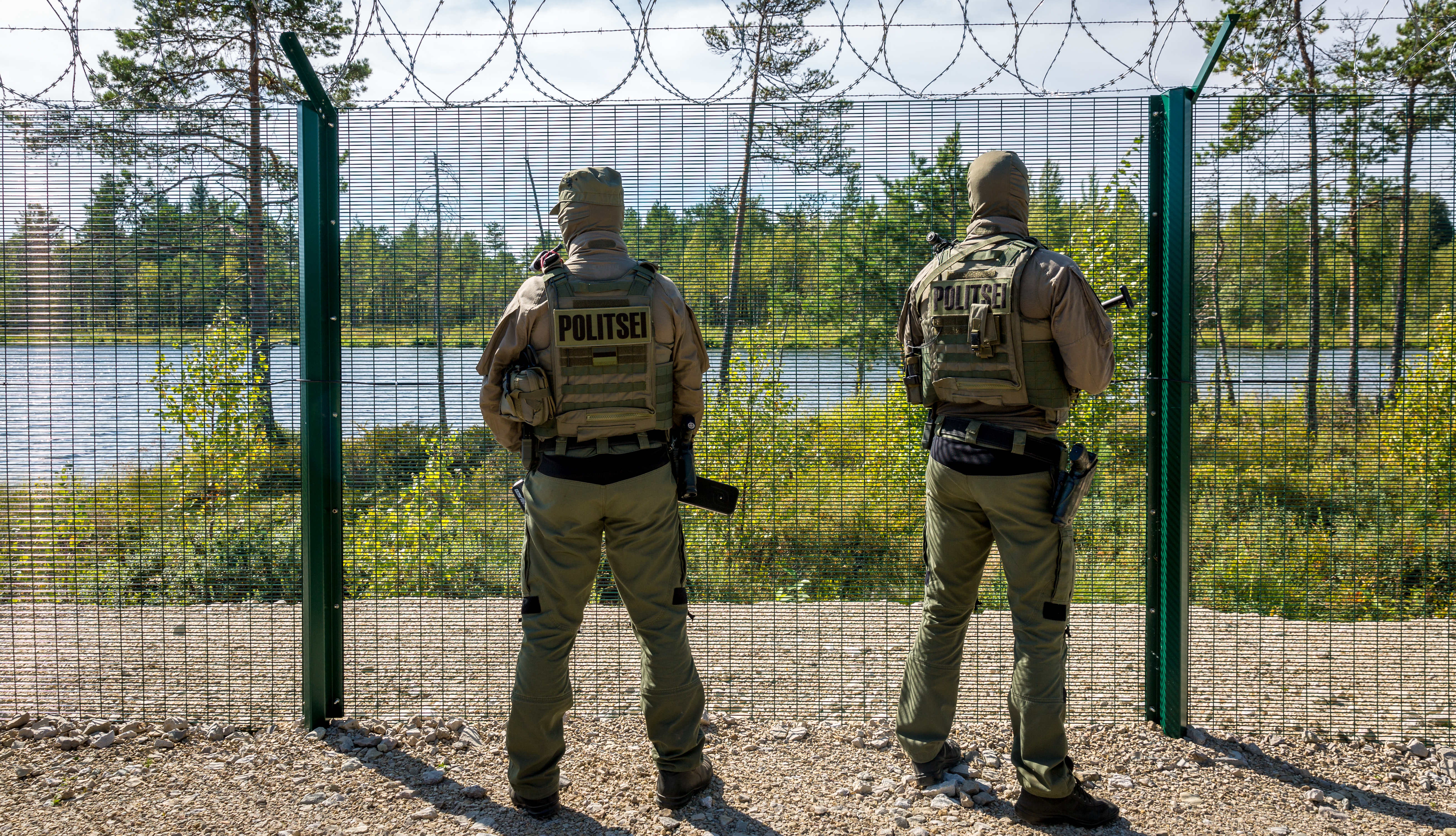 Eesti Vabariigi kagupiir